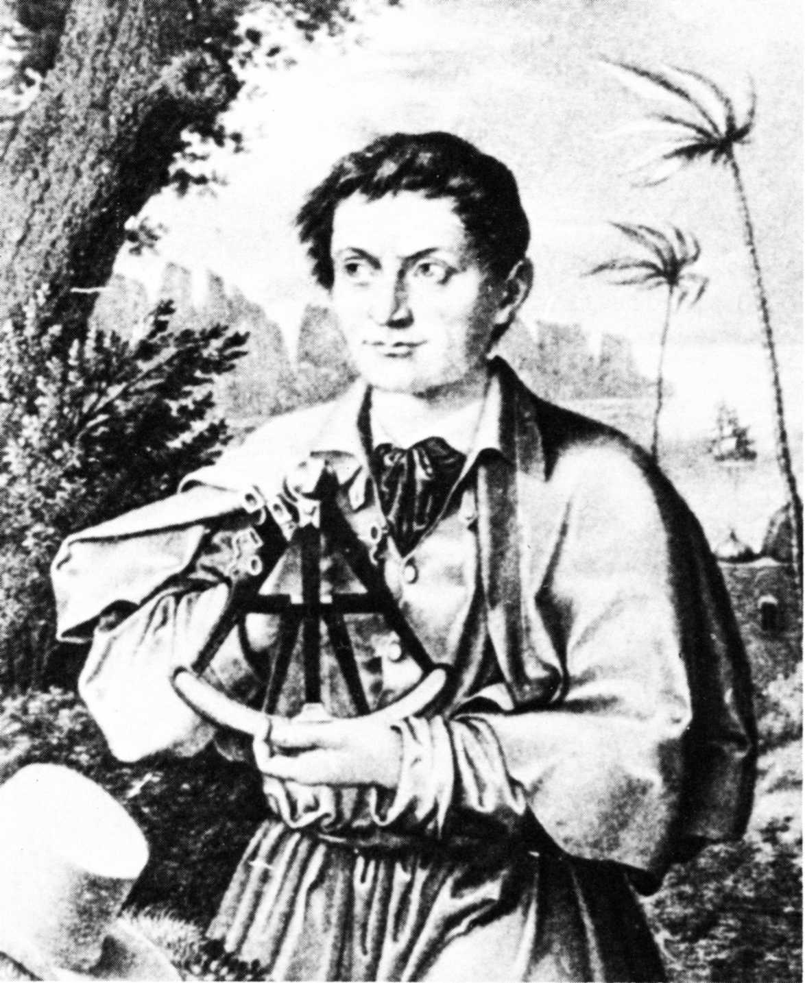 Mensen Ernst, Norwegian long distance runner and globetrotter